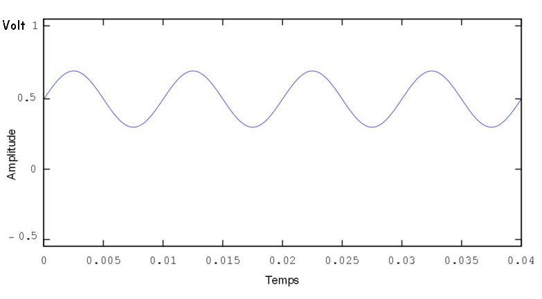 Poste a galène. Cette image représente le signal modulateur (celui de plus basse fréquence)